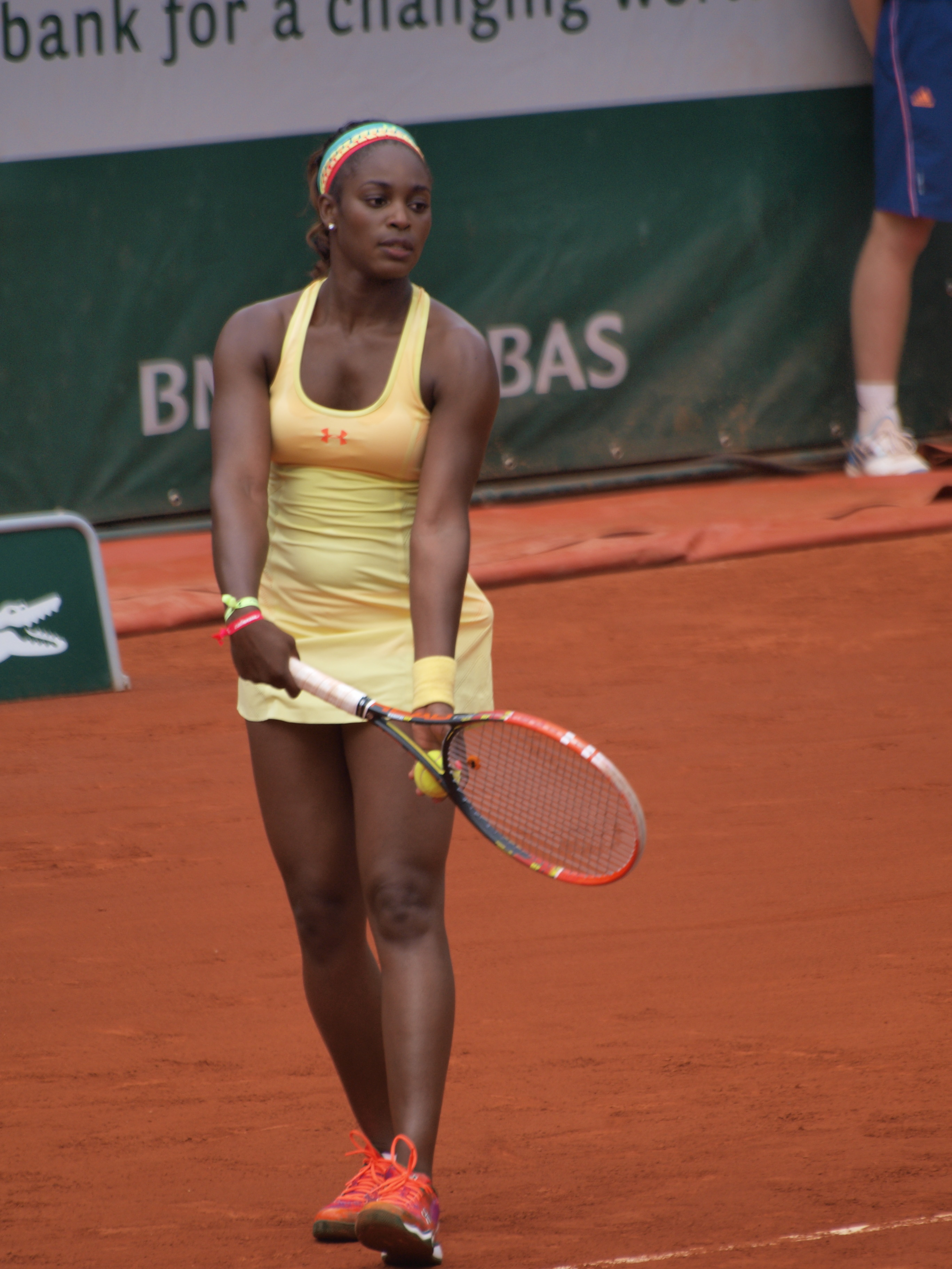 Internationaux de France de tennis, le 2 juin 2014, sur le court Philippe Chatrier : Sloane Stephens